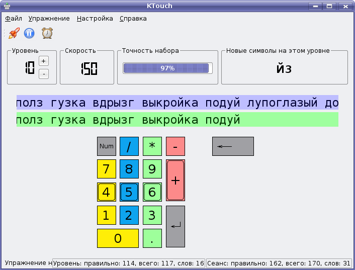 Скриншот KTouch